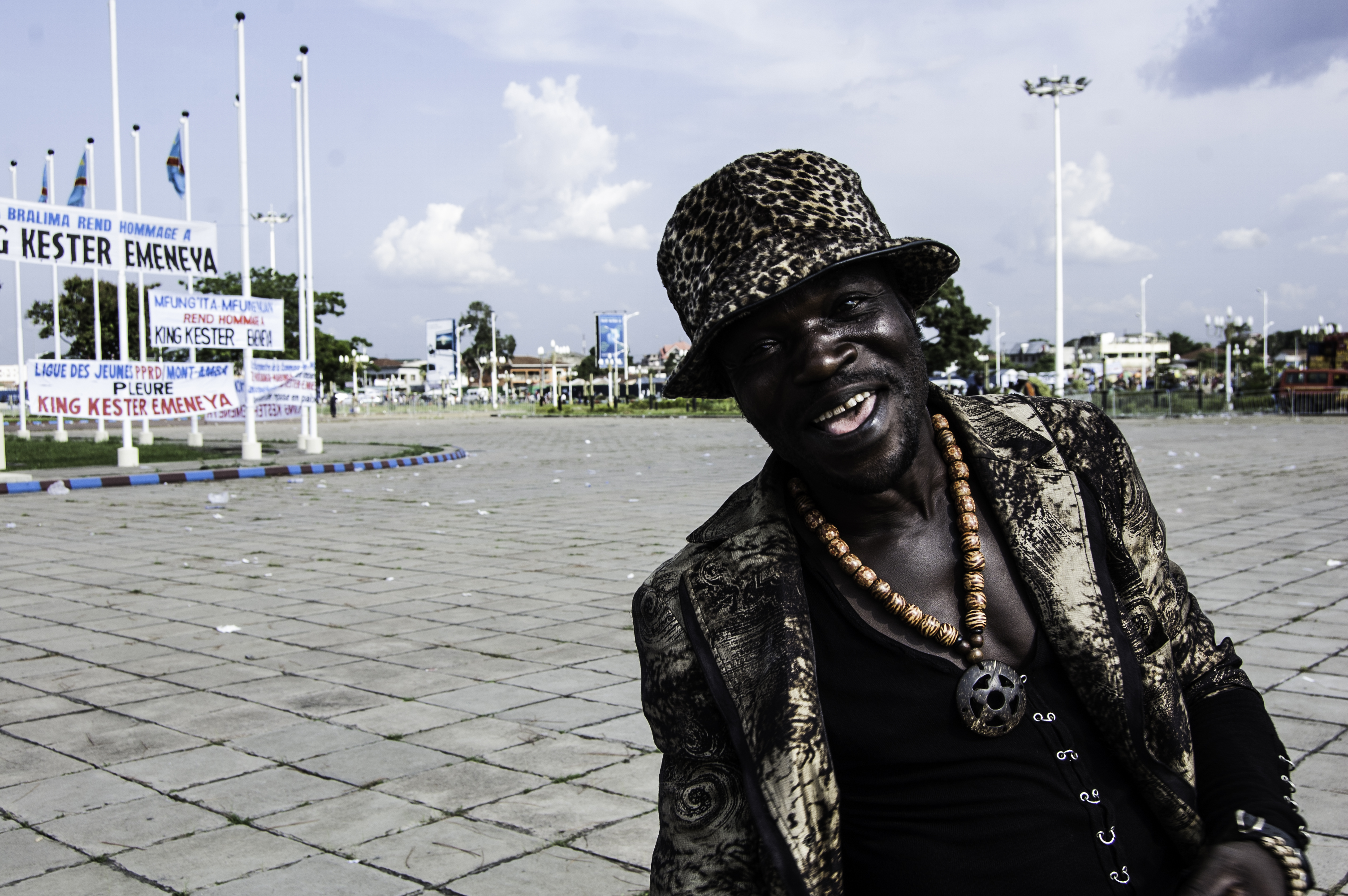 un sapeur de kinshasa, lie modernisme et tradition dans son style This is an image of Cultural Fashion or Adornment from Democratic Republic of the Congo